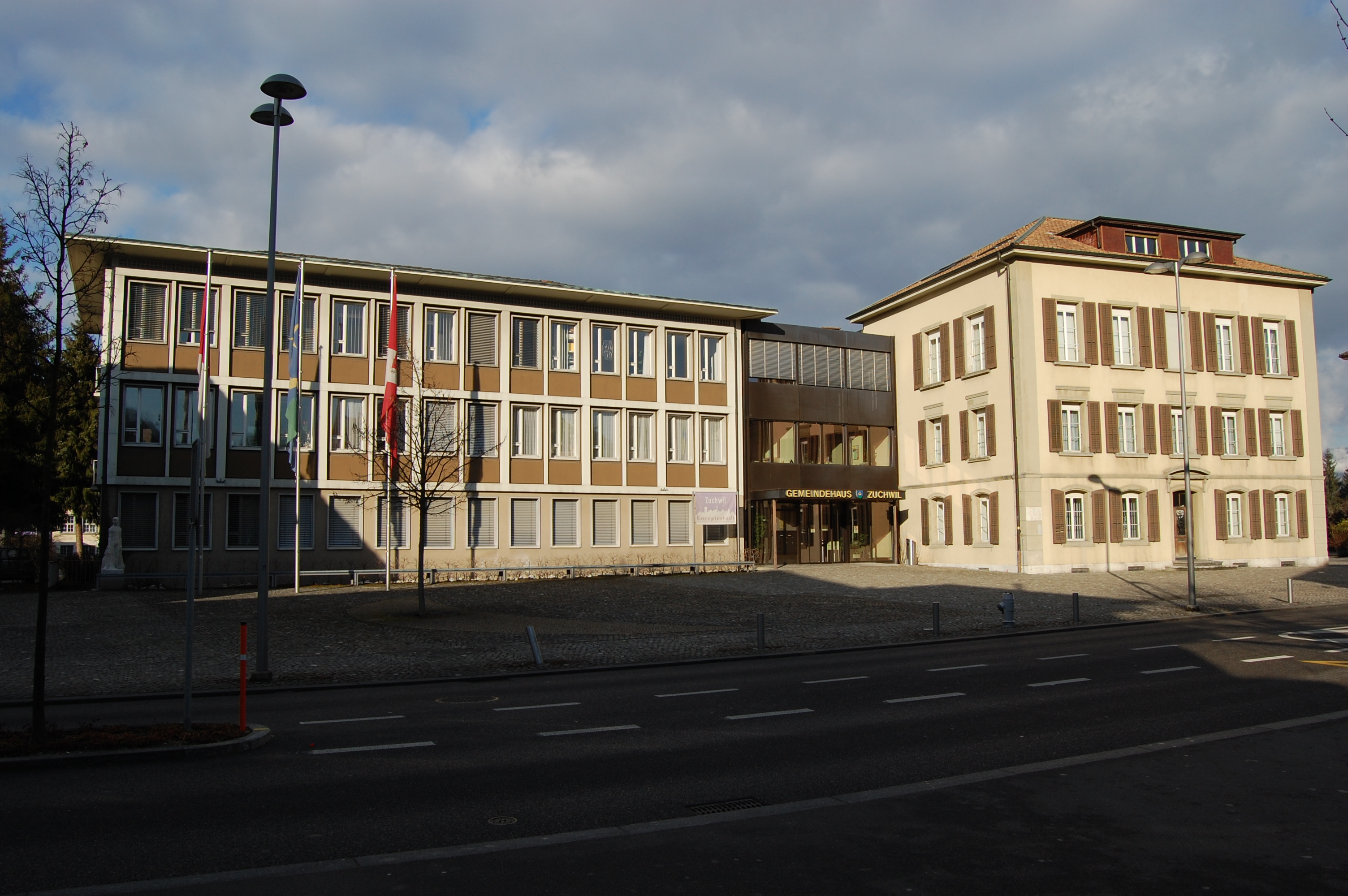 Die Gemeindeverwaltung von Zuchwil